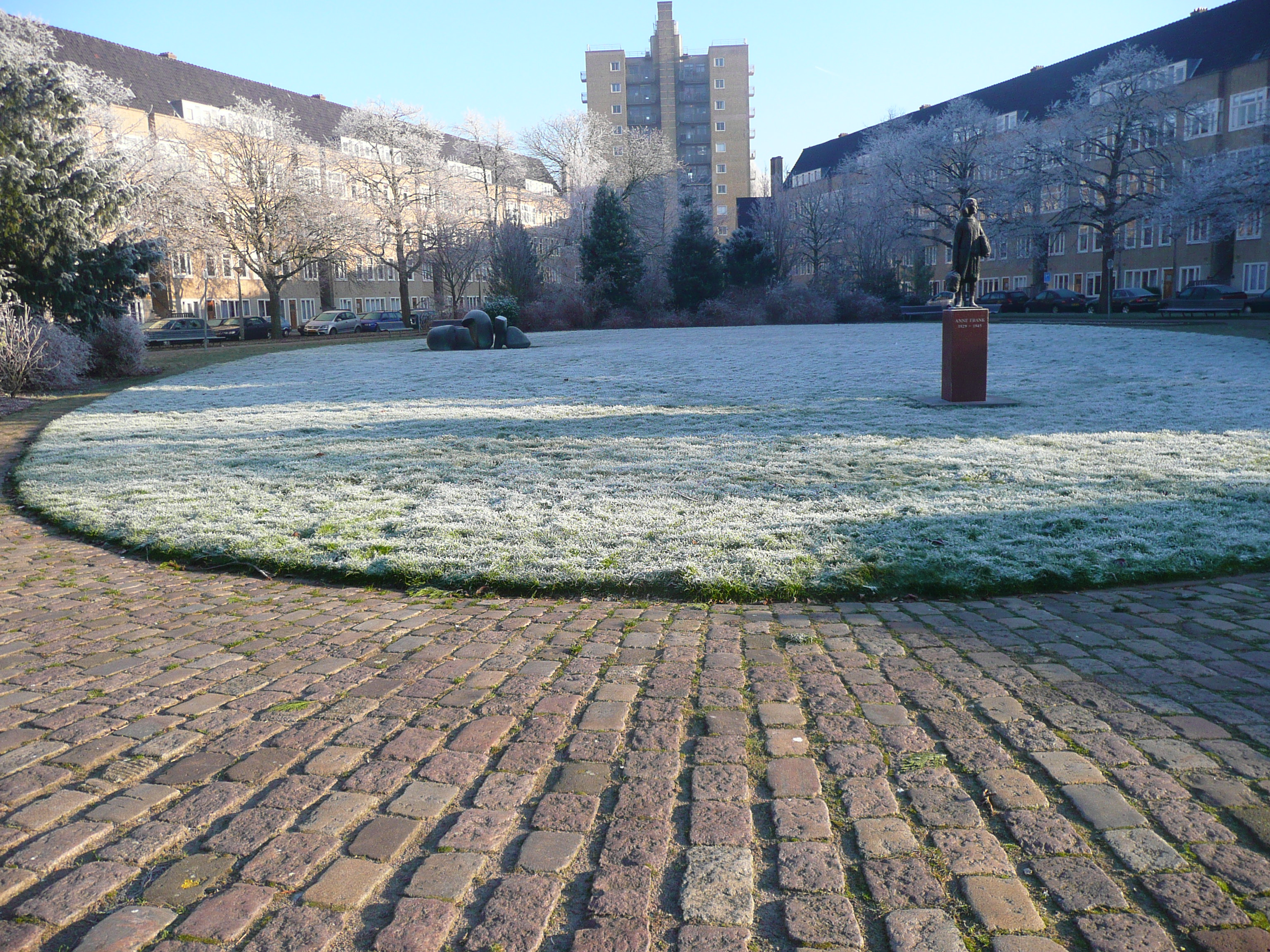 Sculpture Anne Frank, Merwedeplein in Amsterdam/The Netherlands